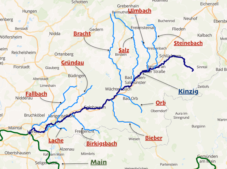 carte réalisée sur umap This map may be incomplete, and may contain errors. Don't rely solely on it for navigation.